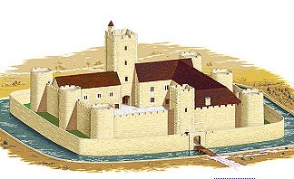 Château de Brie-Comte-Robert au XIIème siècle